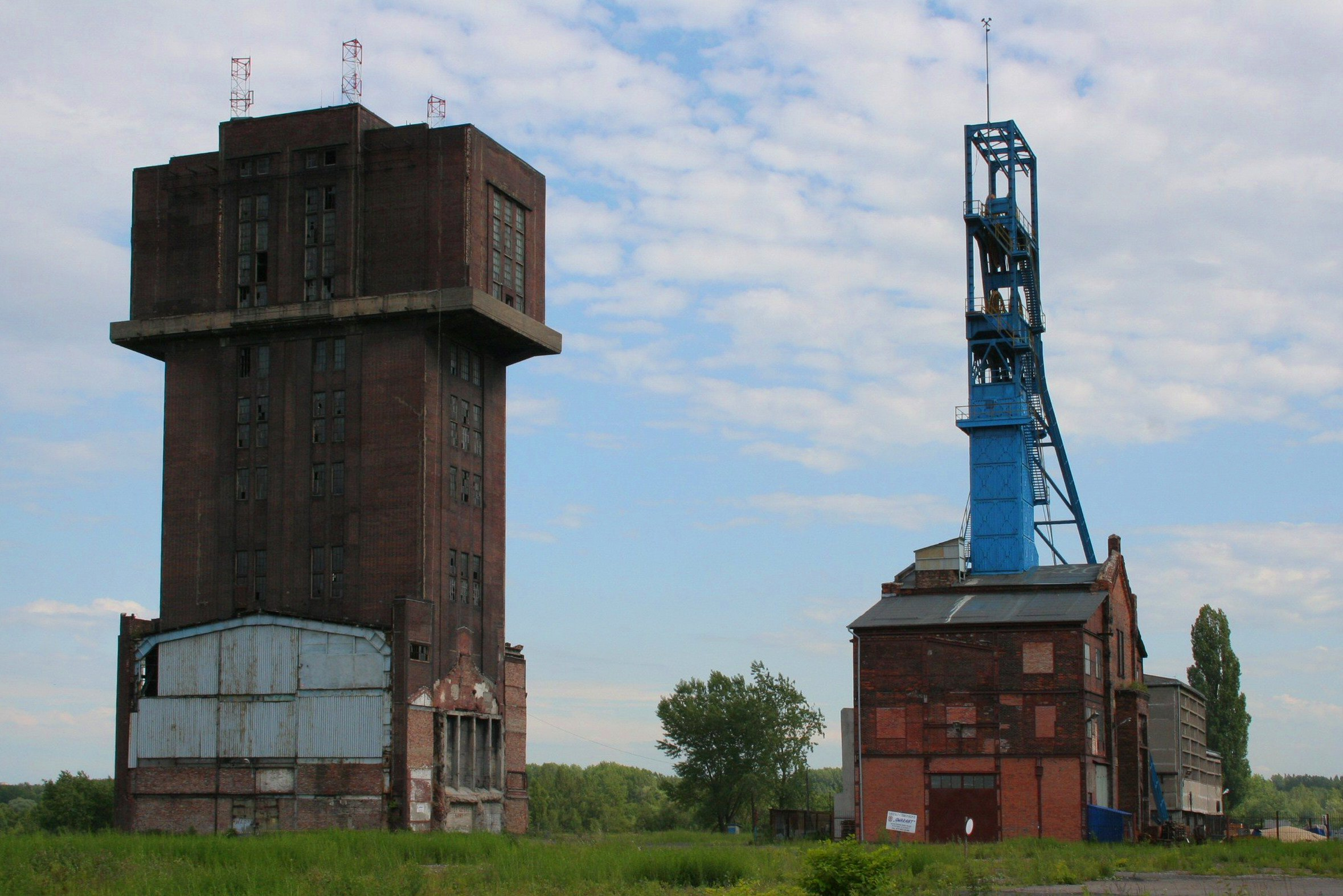 Kopalnia Szombierki w Bytomiu Szombierkach.